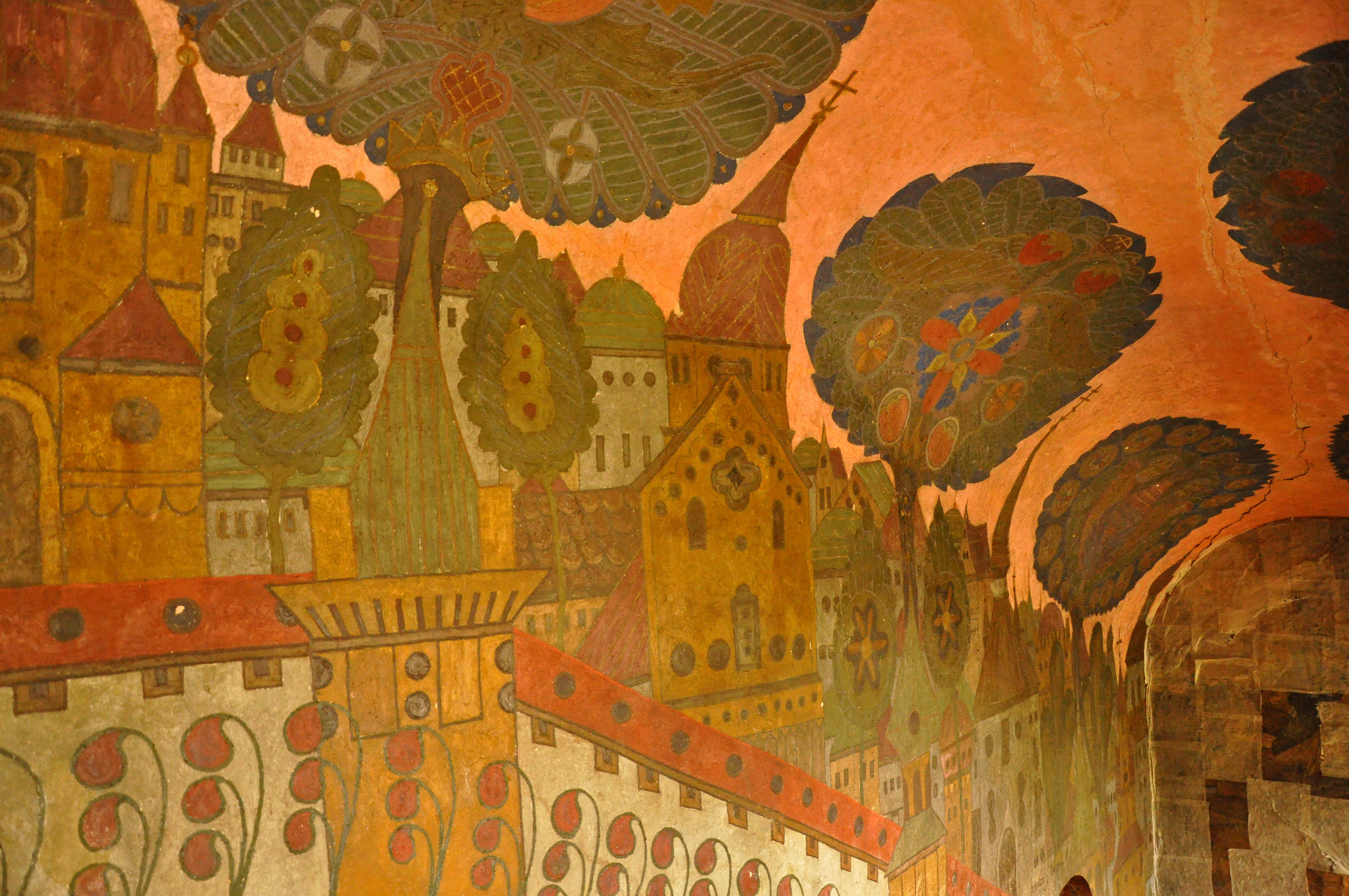 Розпис галереї. Церква Всіх Святих Києво-Печерської лаври. Розпис галереї, яка веде до храму з вулиці